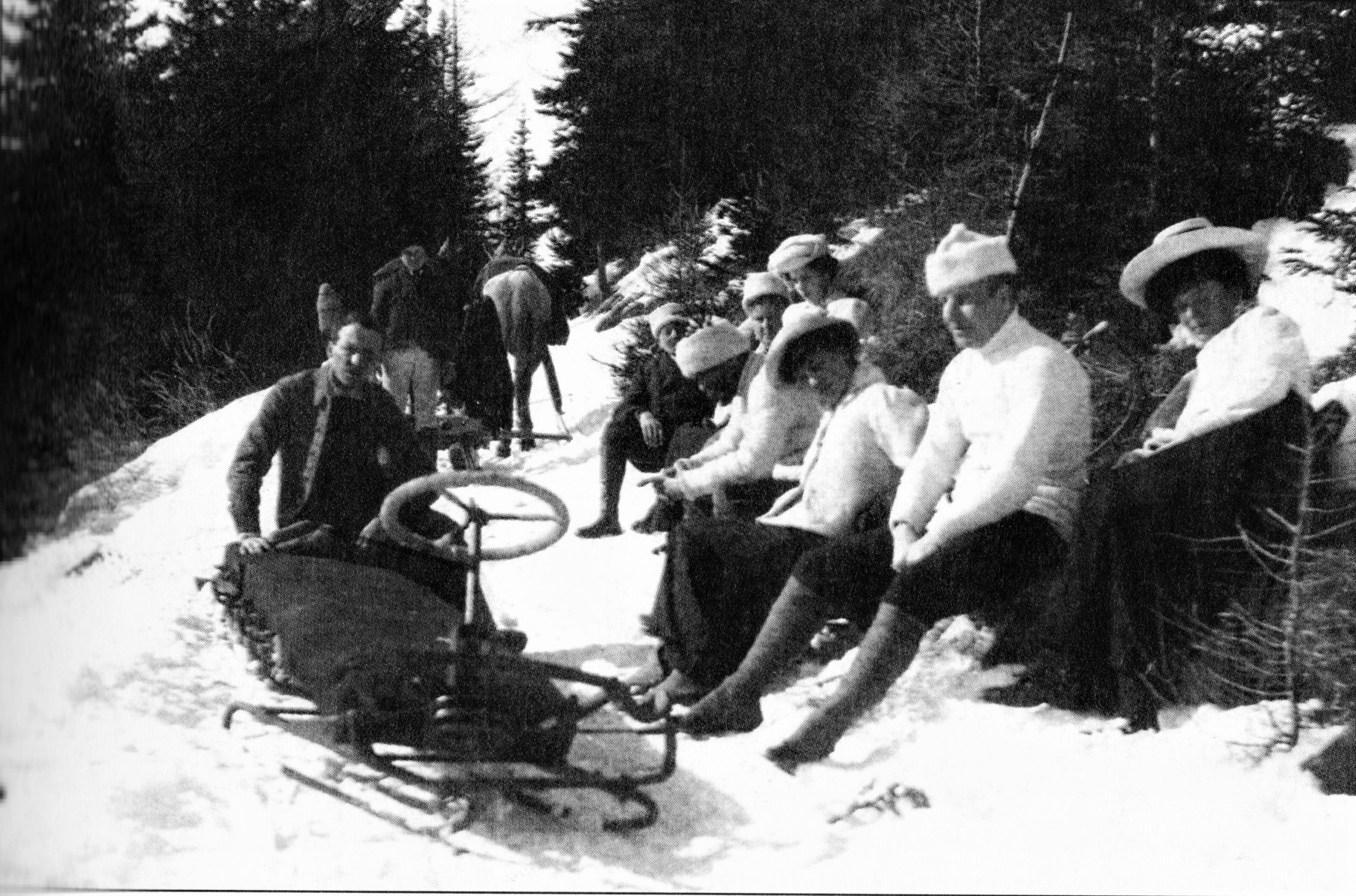 Pred prvou svetovou vojnou majiteľ liečebných kúpeľov v Tatranskej Polianke vo Vysokých Tatrách Michal Guhr v zime cestu k Sliezskemu domu premenil na sánkarskú dráhu. Bola dlhá až štyri kilometre a každý rok sa na nej konali preteky. Snímka je asi z rokov 1920-25.